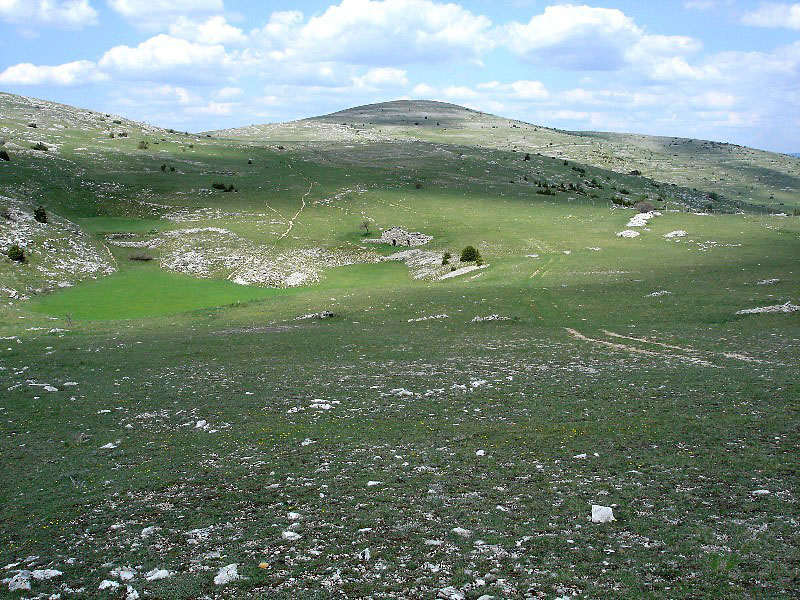 Le mont Gargo, point culminant du causse Méjean, France